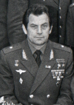 Начальник штаба Дальней авиации ВВС СССР, дважды Герой Советского Союза генерал-майор Владимир Васильевич Ковалёнок в штабе Дальней авиации